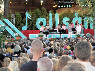 Allsång på Skansen, Skansen, Stockholm, Sweden.